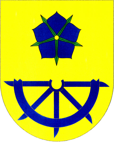 Znak obce Pístina